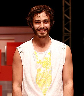 Floripa Fashion Donna DC - Verão 2007 Desfile: Puramania